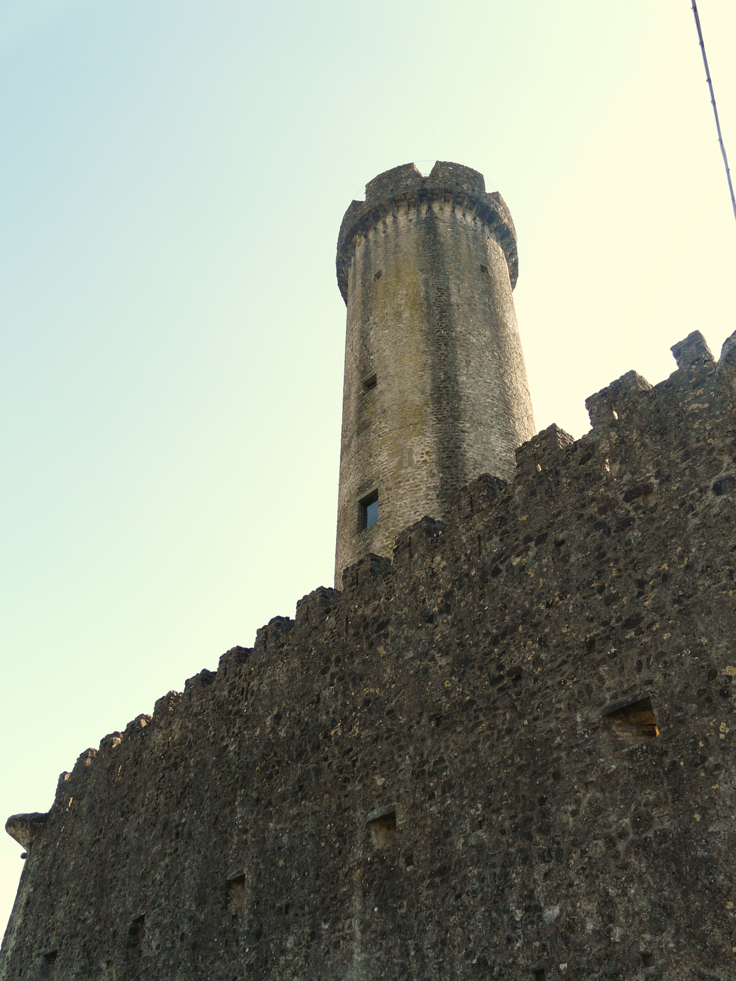 Immagini del borgo di Malgrate, Villafranca in Lunigiana, Toscana, Italia